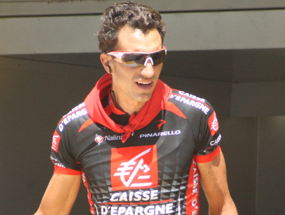 Départ de la 4e étape du Tour de France 2010 à Cambrai - Ruben Plaza